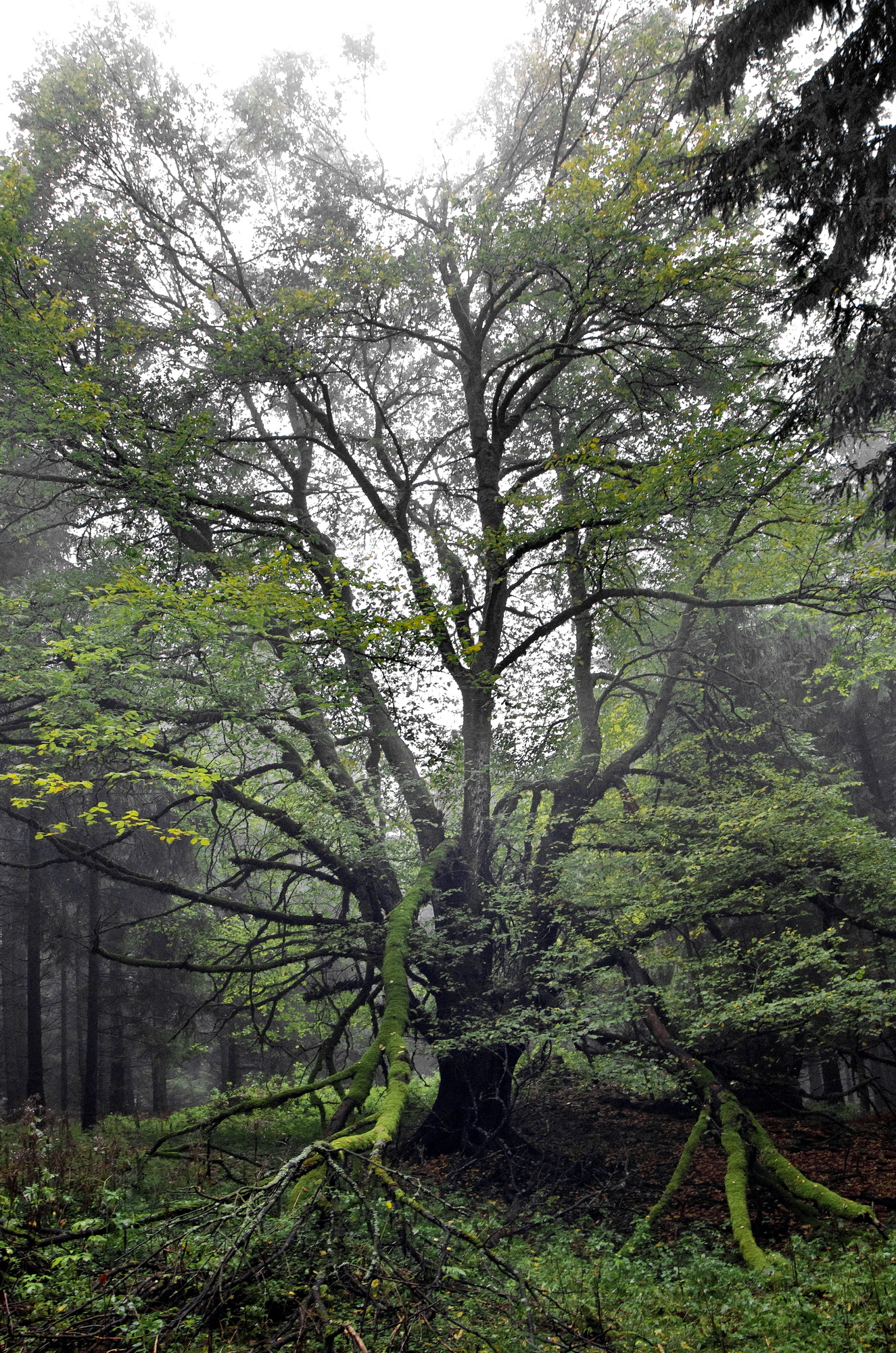 Památný strom - Jilm u Leistnerovy hájovny - Slavkovský les, okres Sokolov